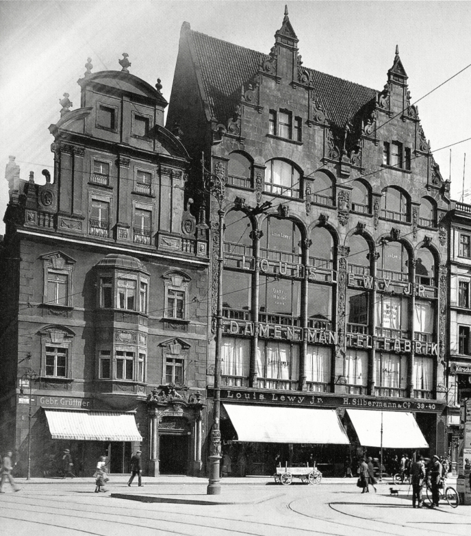 Dom Handlowy Louis Lewy i kamienica Pod Złotym Psem